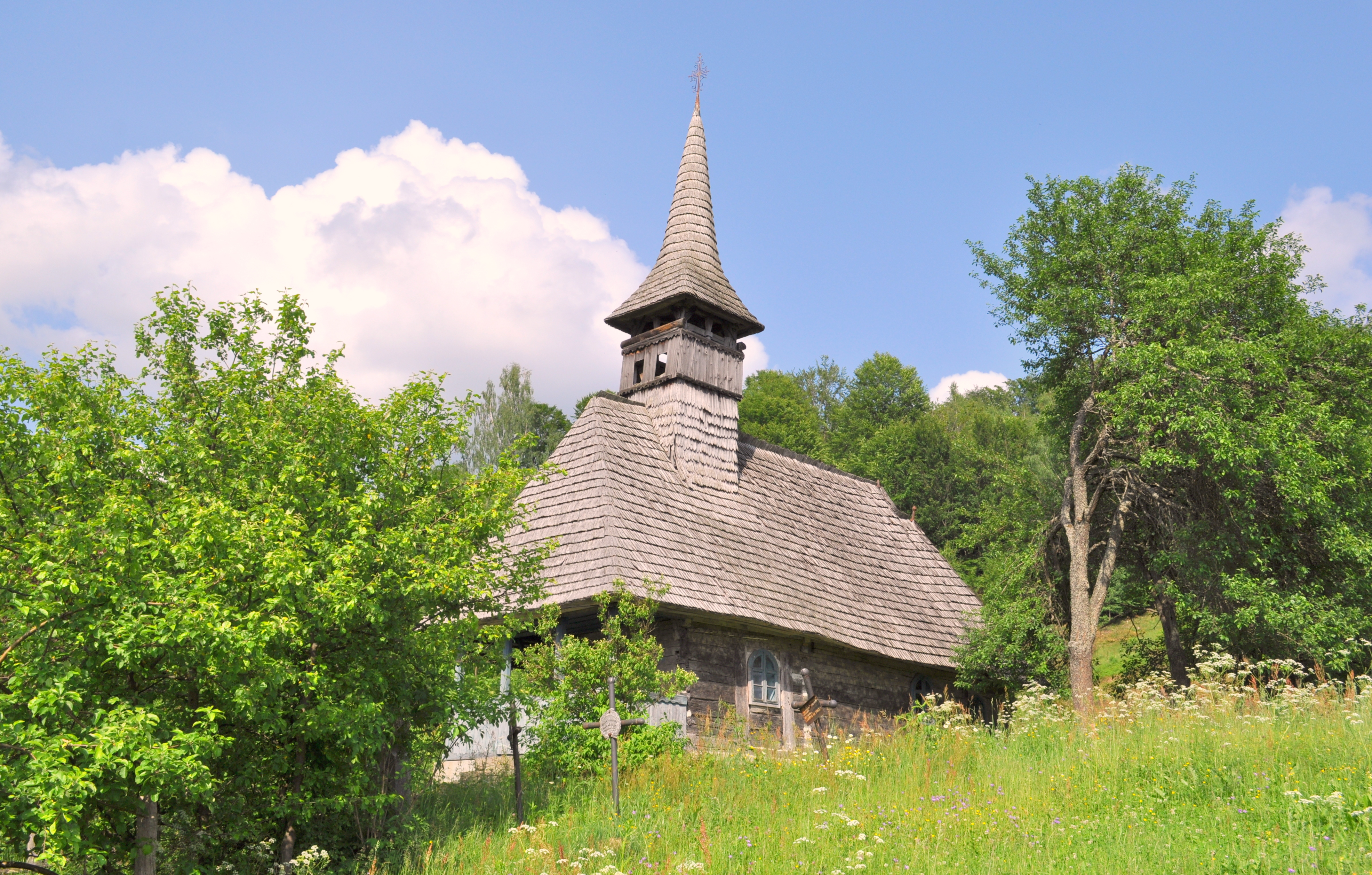 Biserica de lemn "Sf. Ioan Evanghelistul" , sat IZVOARELE; comuna CERNEŞTI